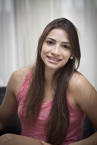 SAO PAULO, SP, BRASIL, 12-04-2012, 11h00: Lais Souza, 23, voltou a treinar essa semana com a selecao brasileira de Ginastica Olimpica. (Foto: Ze Carlos Barretta/Folhapress ESPORTE)